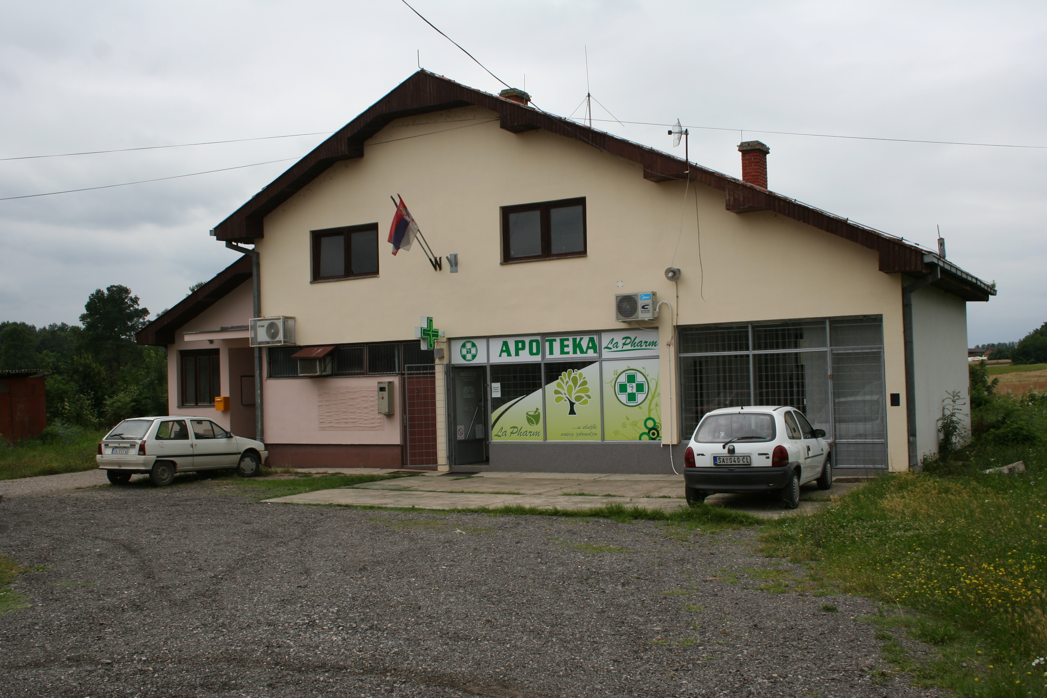 Pošta i Dom kulture, Gornja Vranjska